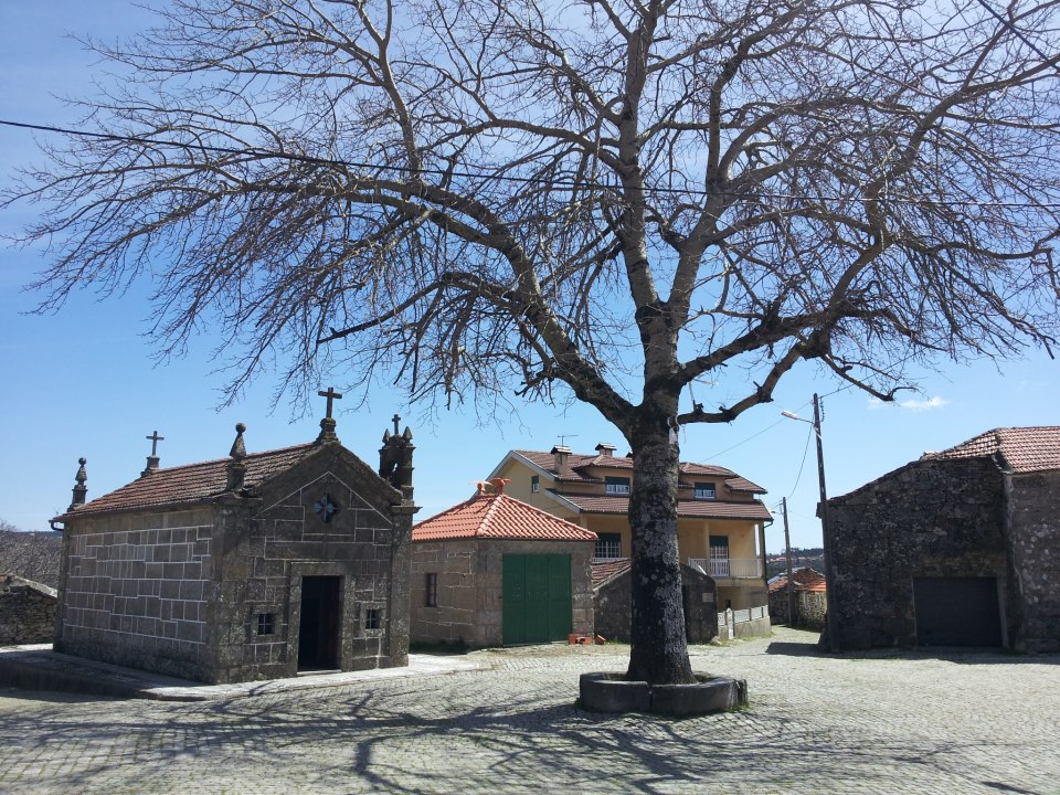 Largo da Capela